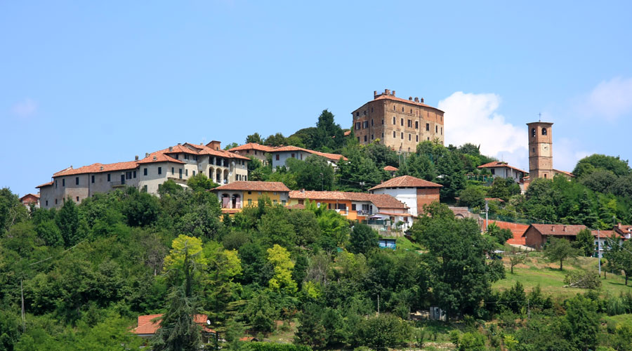 Veduta di Pavarolo (TO)